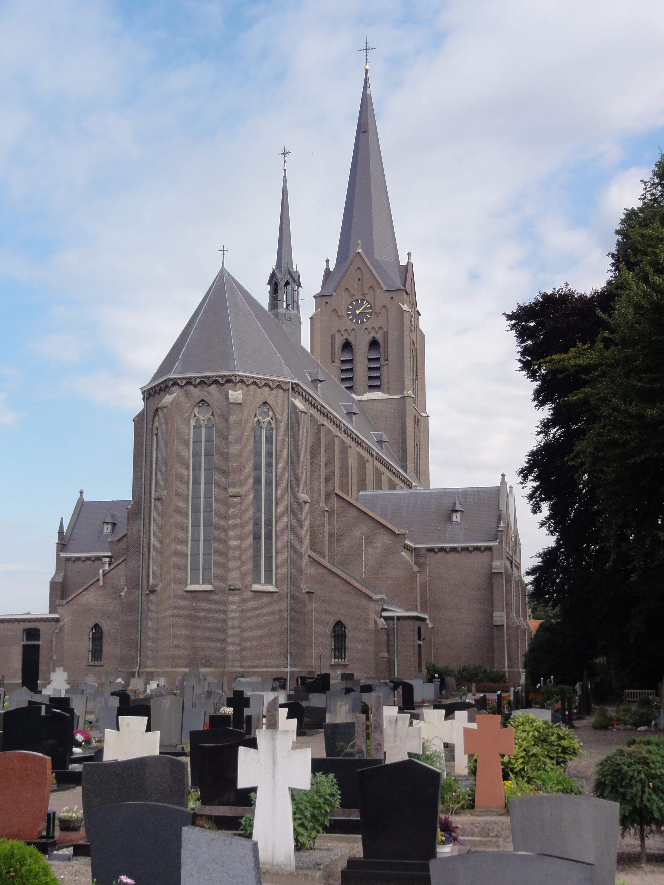 Zeeland (Landerd) Rijksmonument 519138 kerk, Kerkstraat 51, achteraanzicht 63″ N, 5° 40′ 20.11″ E Object location51° 41′ 51.26″ N, 5° 40′ 24.8″ E